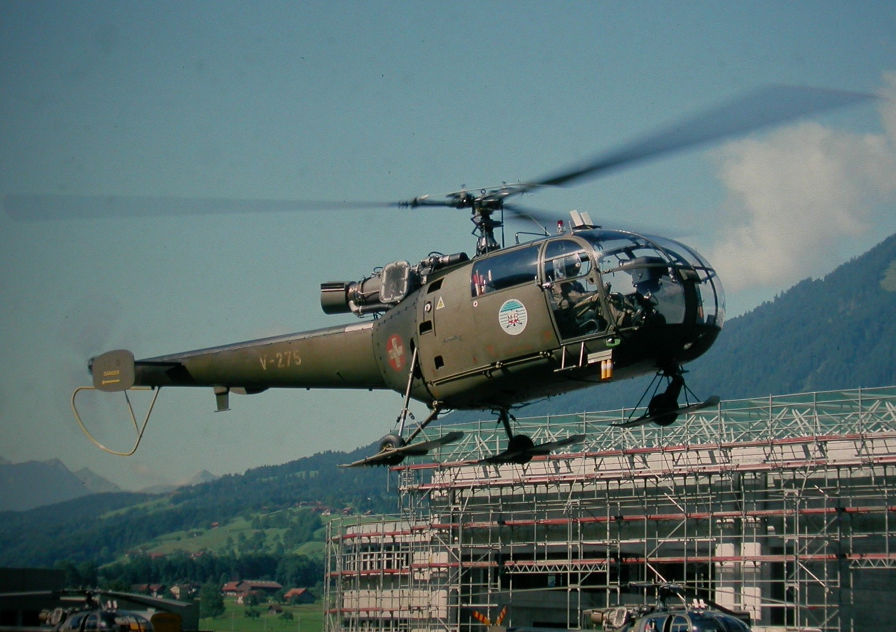 Alouette III der Schweizer Luftwaffe mit Emblem des MilitärHelikopterRettungsdienst MHR im Sommer 1994